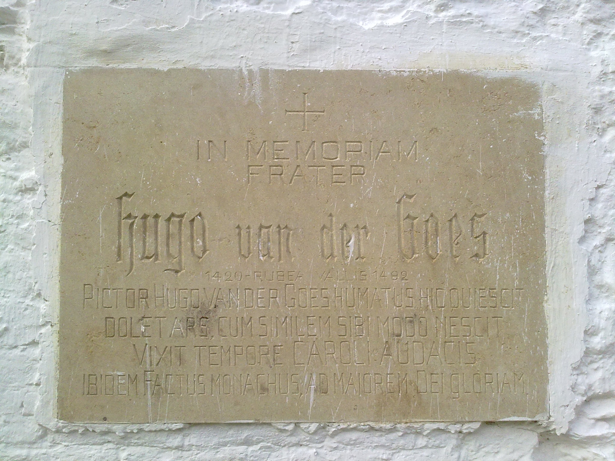 Plaque commémorative située au Prieuré du Rouge Cloître (Auderghem). Le texte est : "In Memoriam Frater Hugo van der Goes 1420 Rubea - Vallis 1482 pictor Hugo Van der Goes humatus hic quiescit dolet ars, cum similem sibi modo nescit vixit tempore CAROLI AUDACIS ibidem factus monachus, ad maiorem dei gloriam."